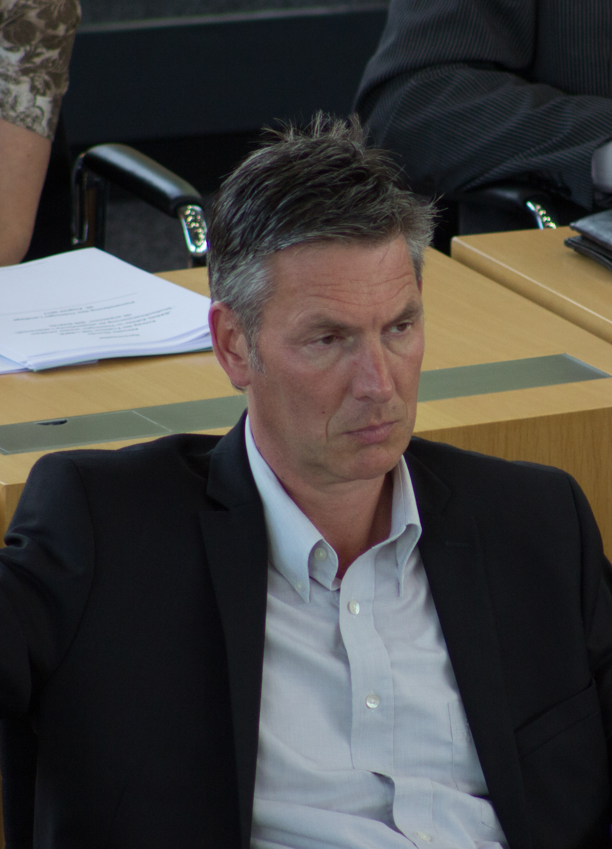 Markus Hoppe im Rahmen der Plenarsitzung des Thüringer Landtag am 30. August 2017 in Erfurt